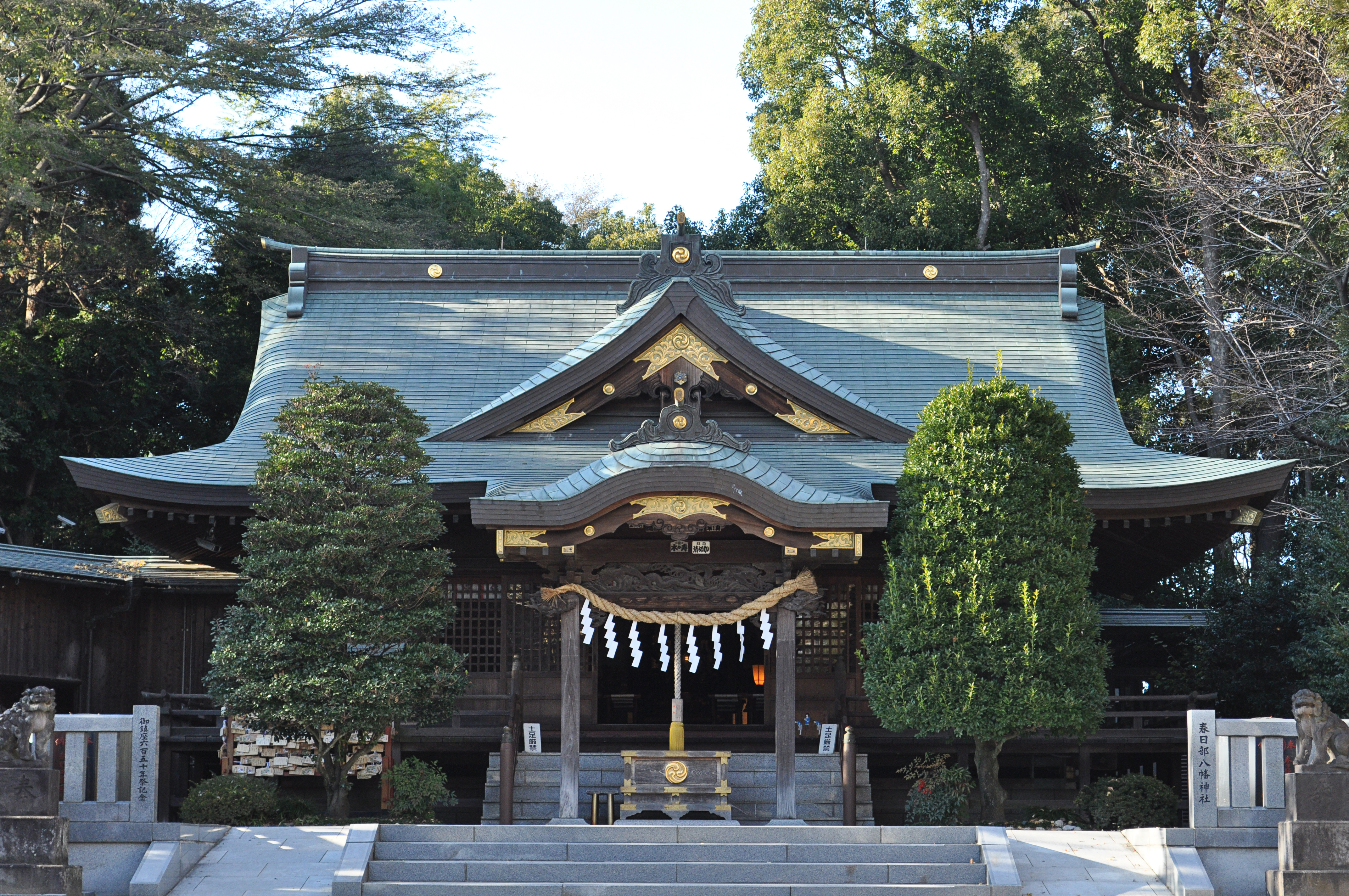 春日部八幡神社拝殿